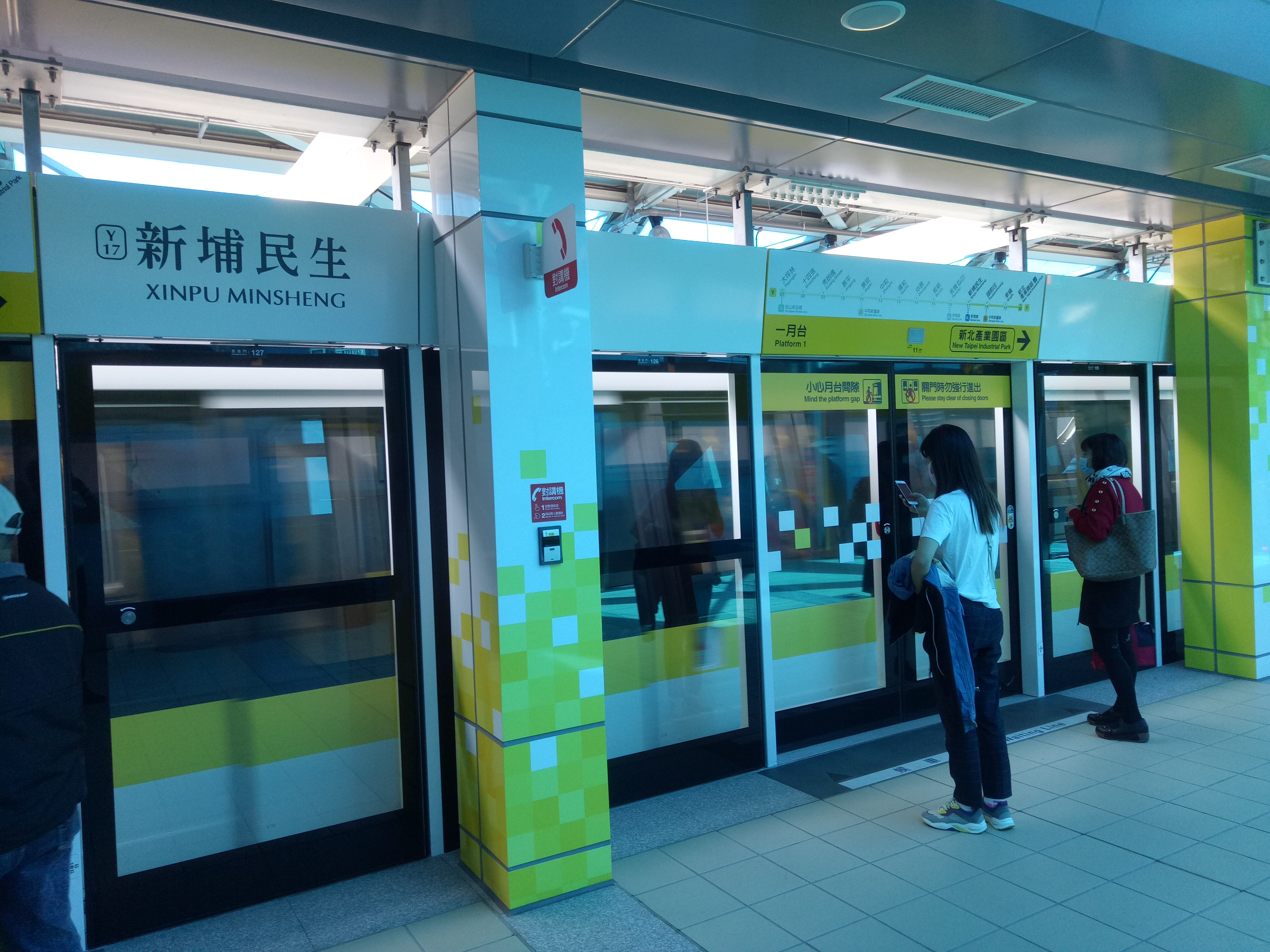 中文（台灣）: 台北捷運新埔民生站第一月台11號門。